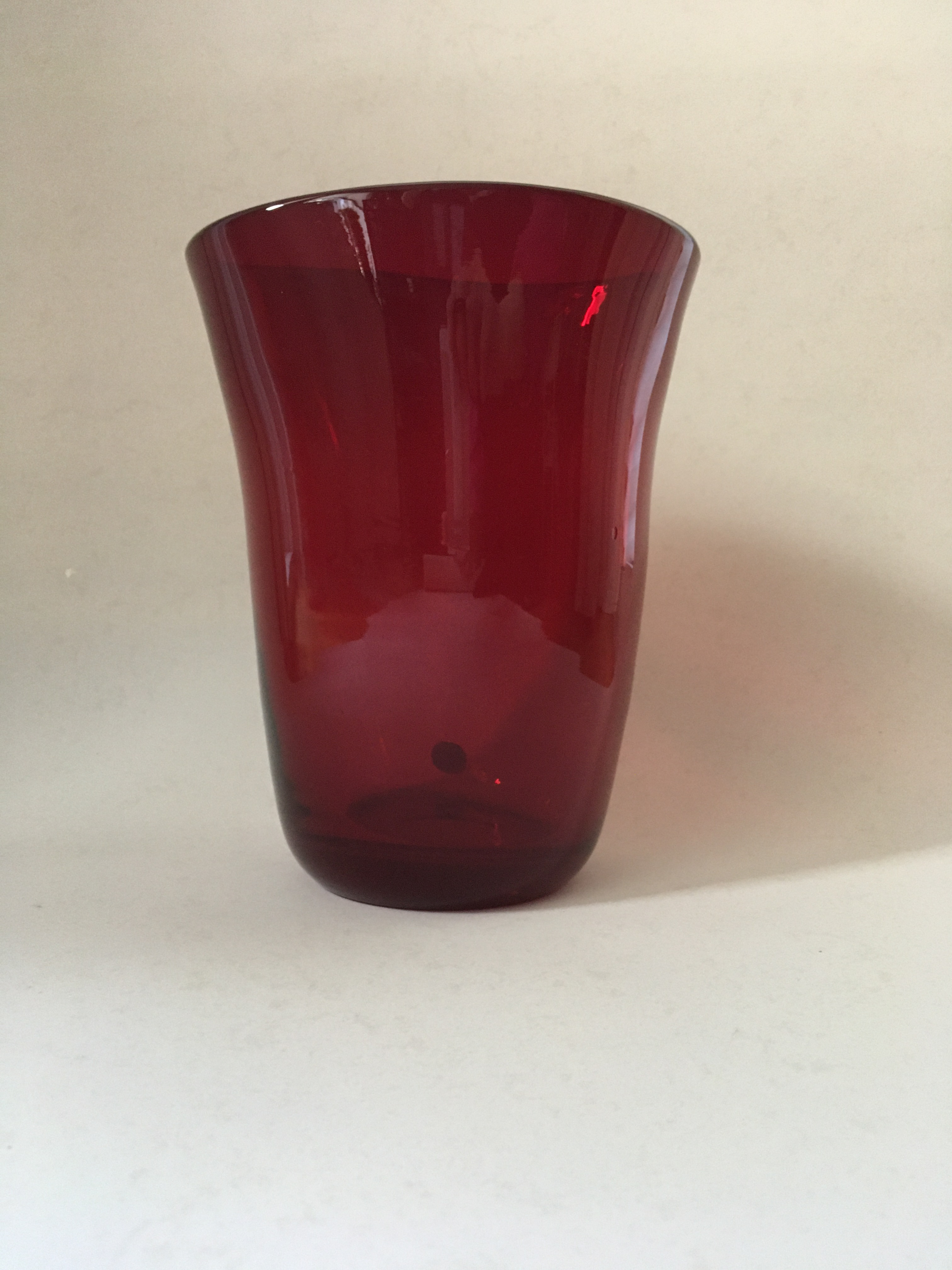 rubinröd vas av Monica Bratt, Reijmyre glasbruk